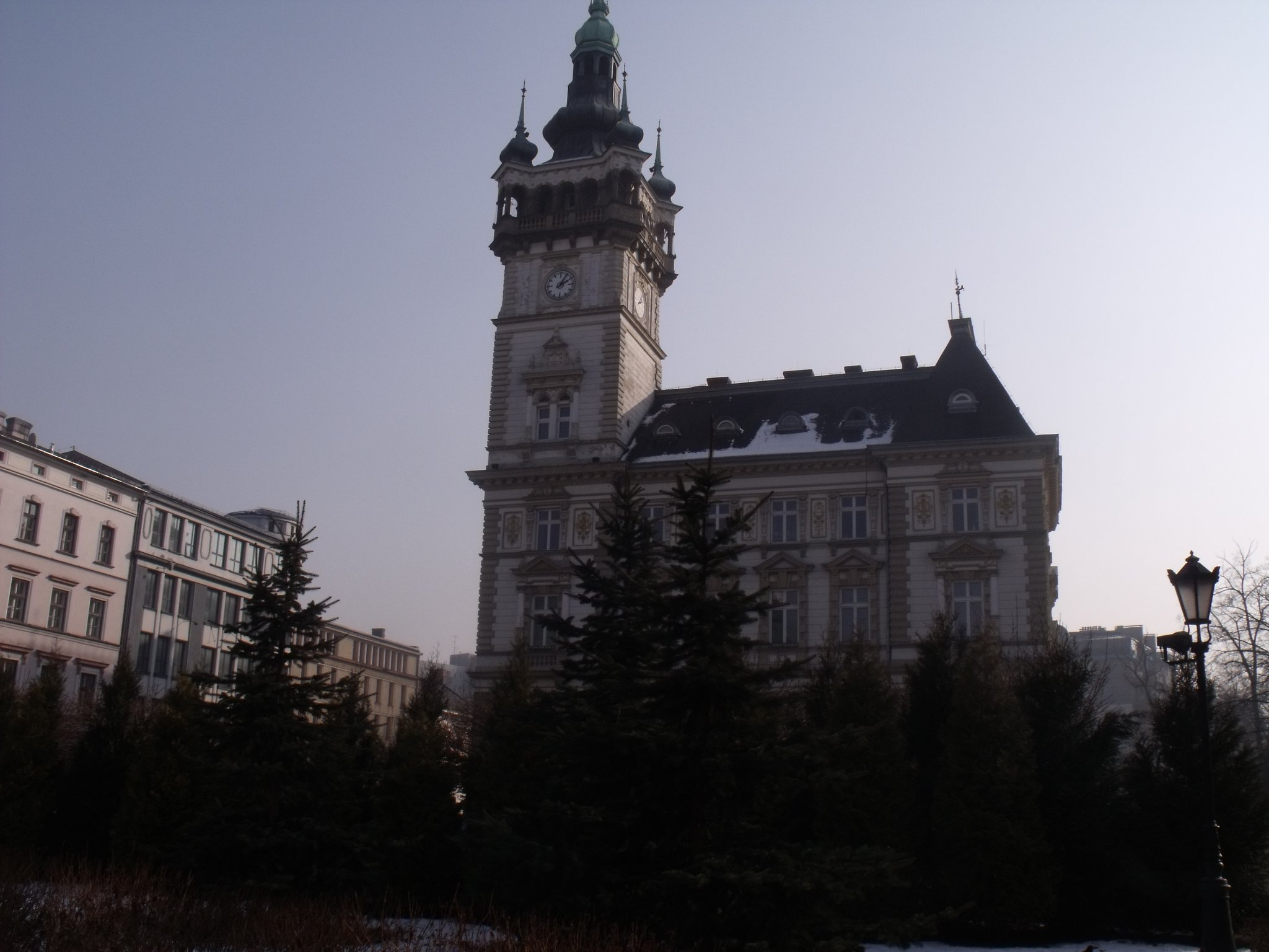 Concello en activo da cidade polaca. Ubicado no centro da cidade.